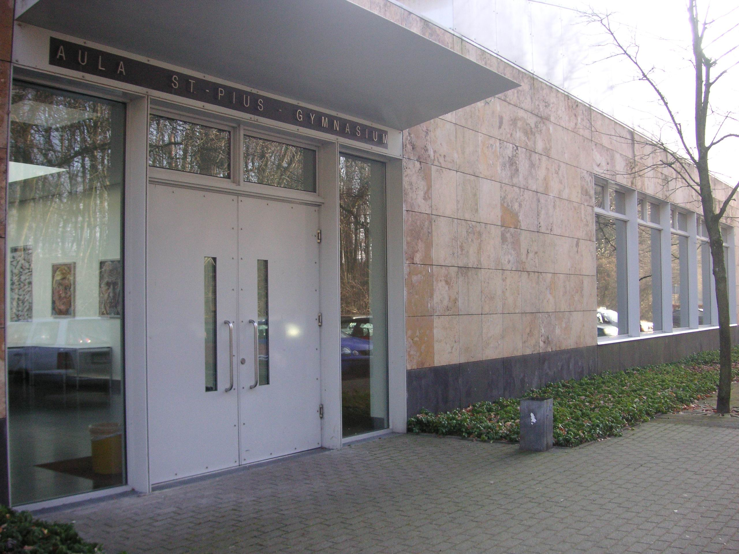 Aula St.-Pius-Gymnasium Coesfeld